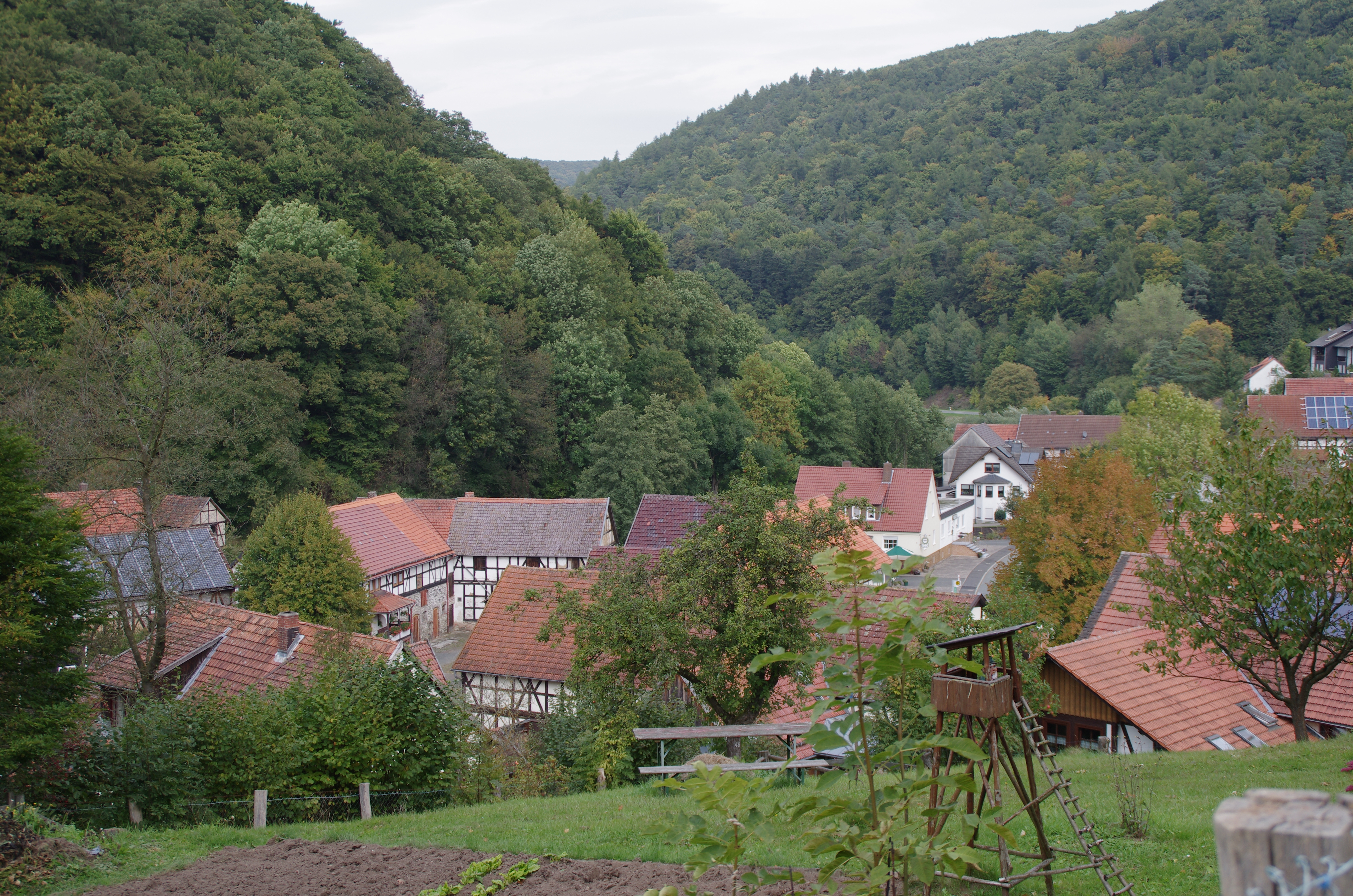 Bad Wildungen, Ortsteil Frebershausen in Hessen. Der Blick von der Kirche zum Ort im Tal.